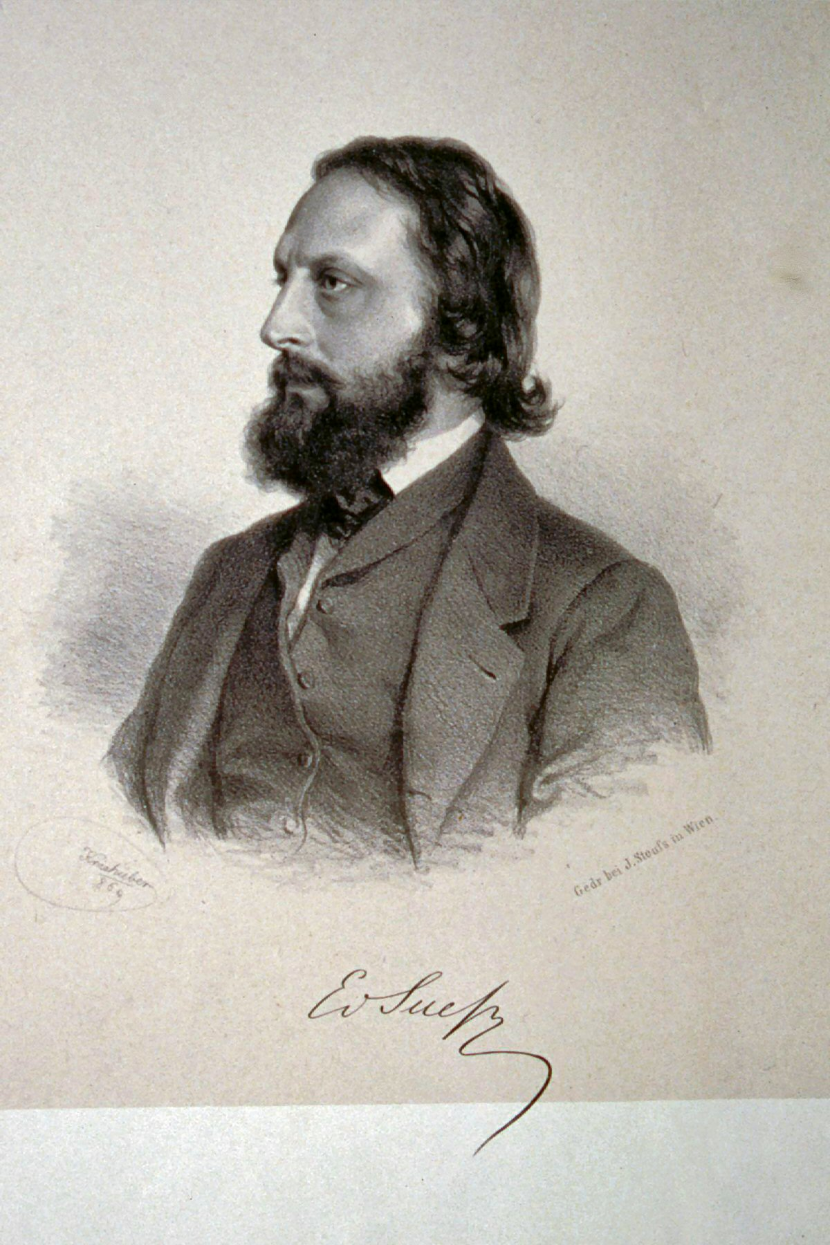 Eduard Suess (1831–1914), Lithographie von Josef Kriehuber (1800–1876) aus dem Jahre 1869